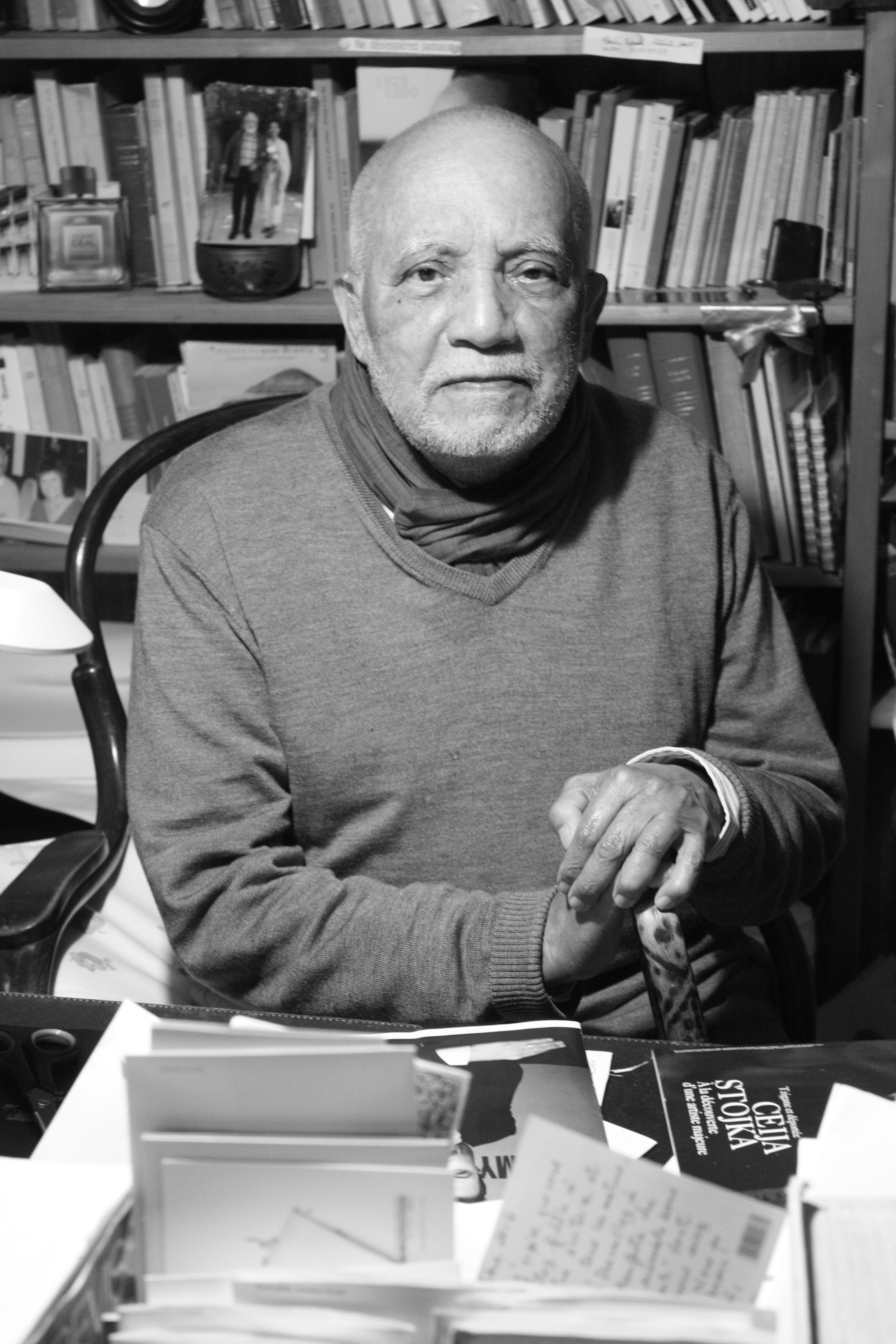 Portrait de René Depestre. Lézignan-Corbières, 25 février 2017.